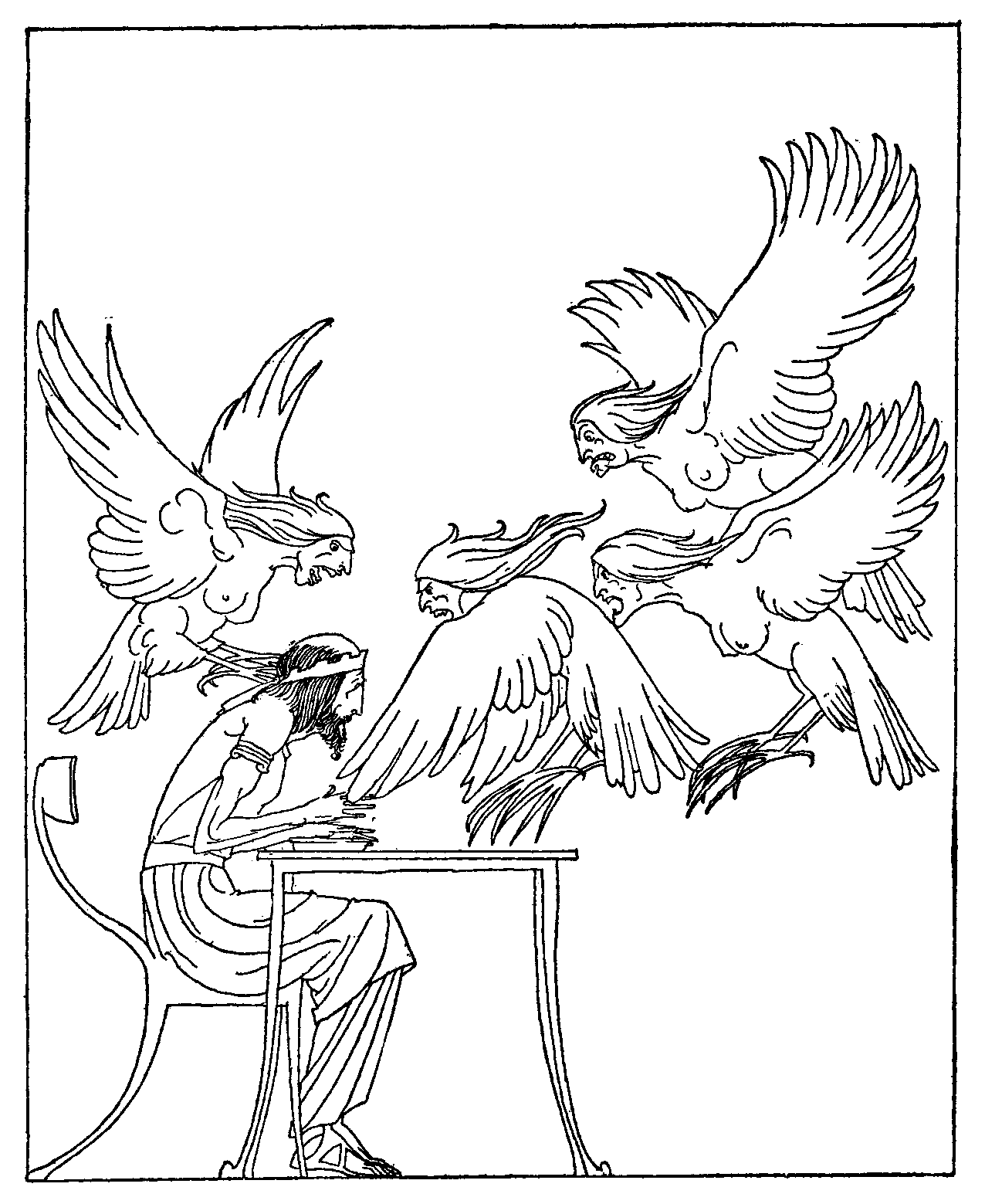 Title page illustration